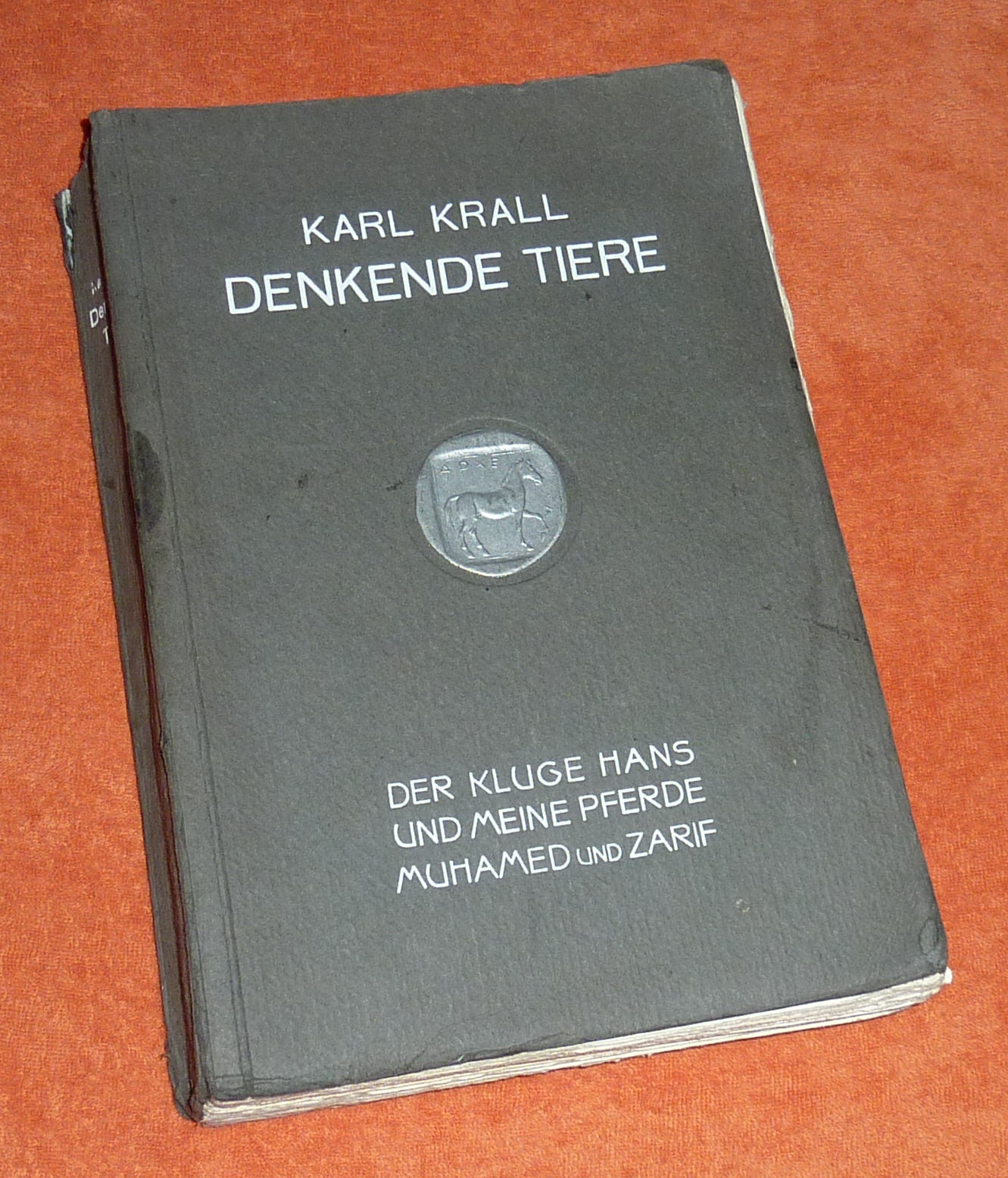 Karl Krall, Denkende Tiere, Leipzig 1912